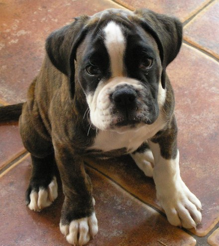 Kölyök boxer (Budapest)